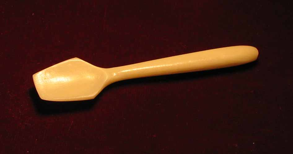 Eisspatel